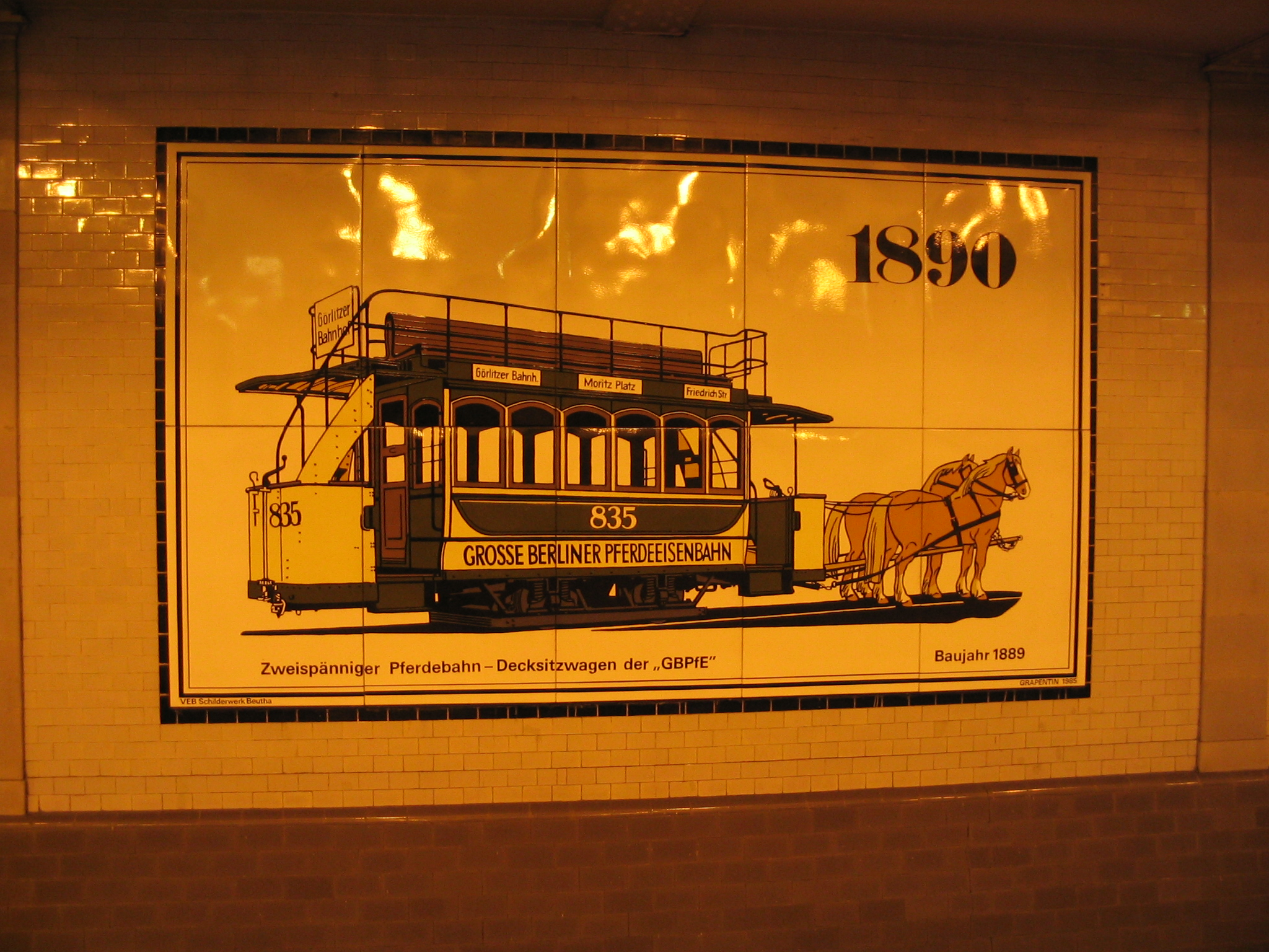 Abbildung einer Pferdebahn in einem Berliner U-Bahnhof